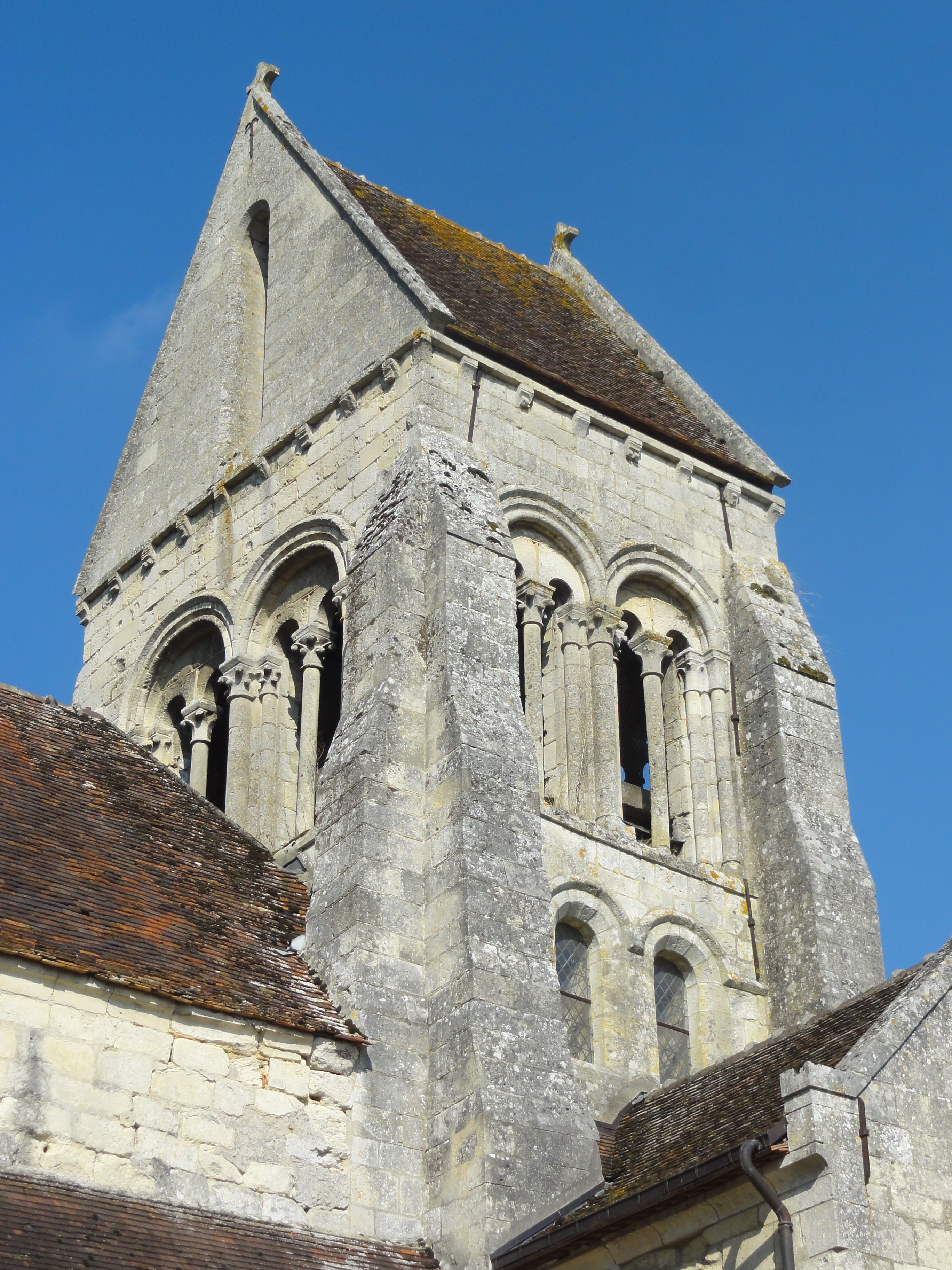 Église Sainte-Marguerite de Glaignes